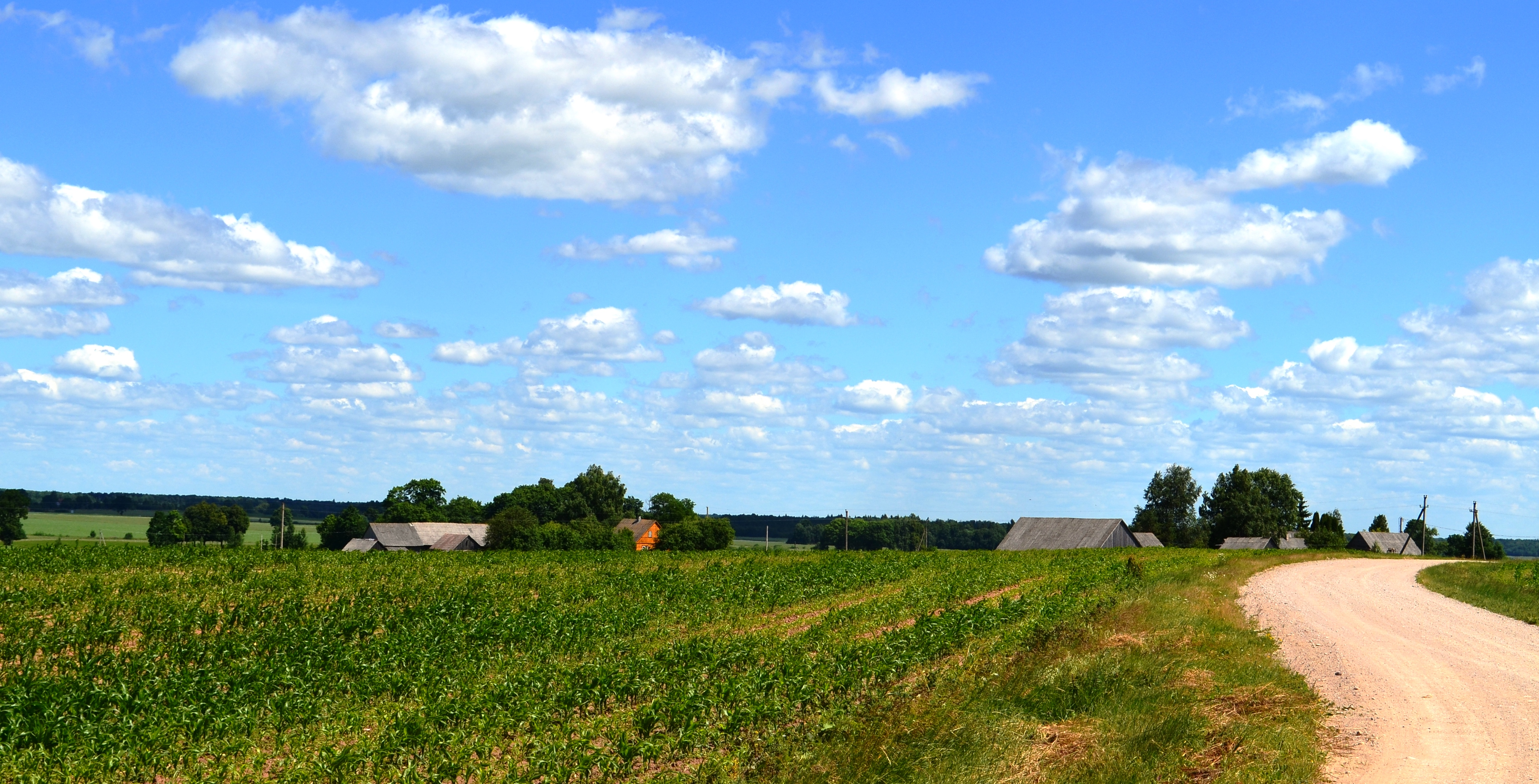 Gučkampis, Kėdainių raj.